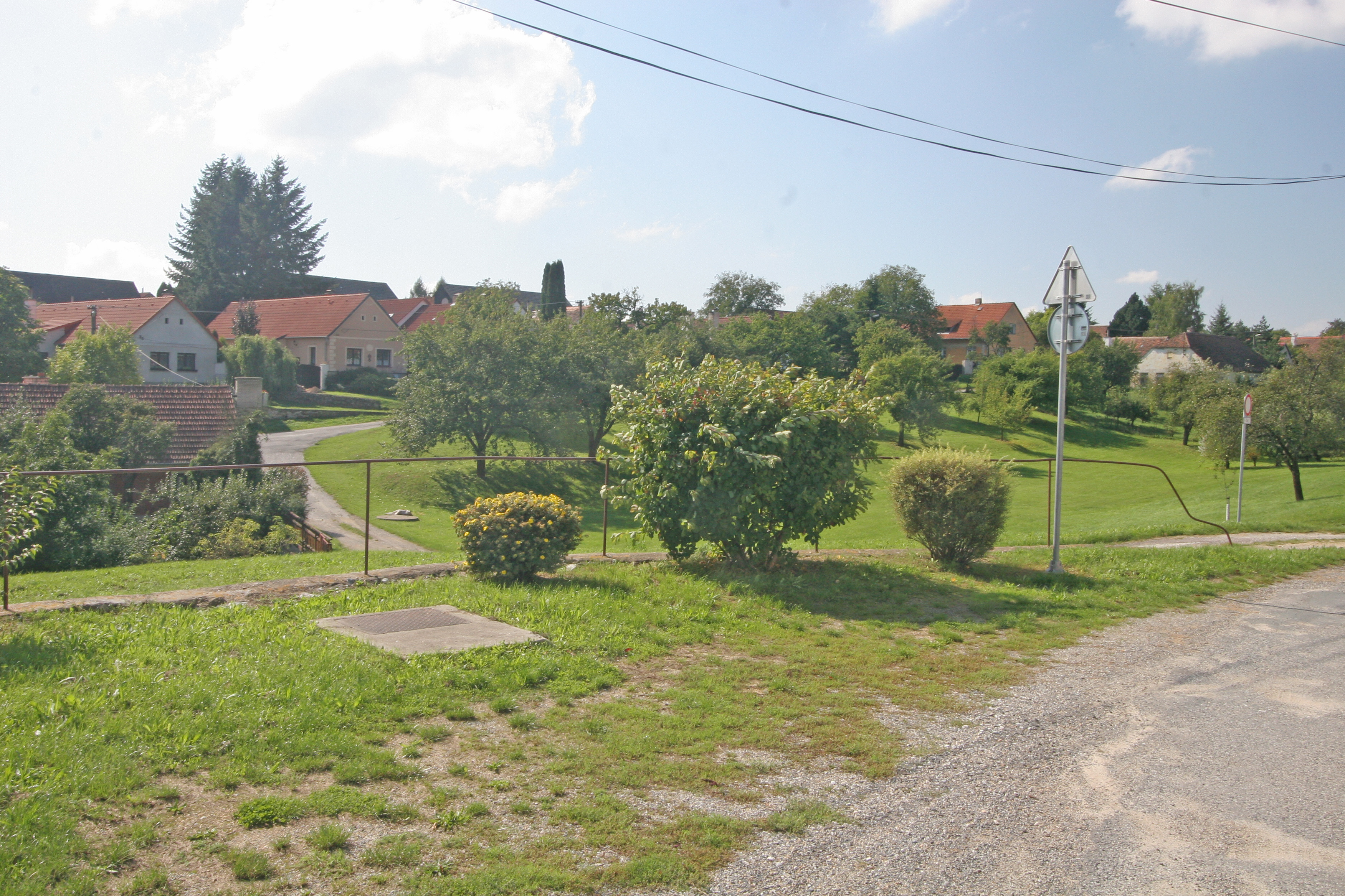 Chvalatice náves